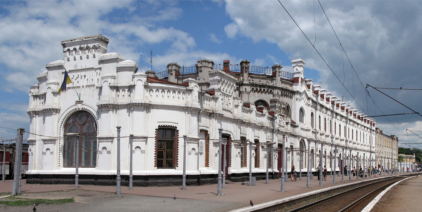 Вокзал станції Козятин I